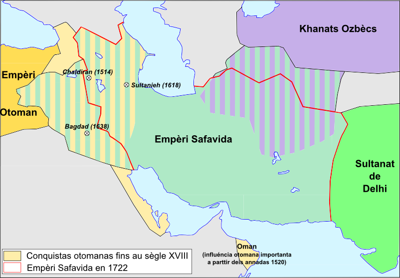 Evolucion de l'Empèri Safavida.